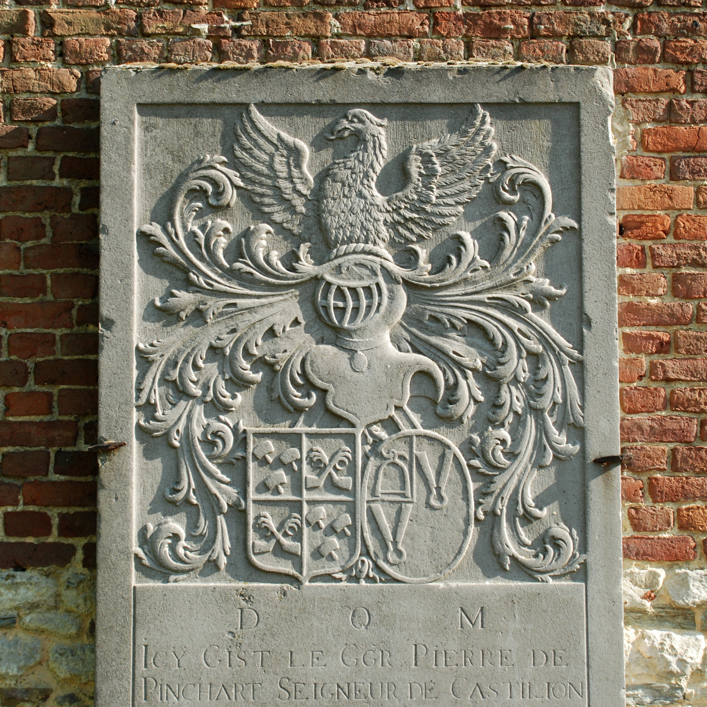 Belgique - Brabant wallon - Mont-Saint-Guibert - Église Saint-Pierre de Corbais - Dalle funéraire de Pierre de Pinchart